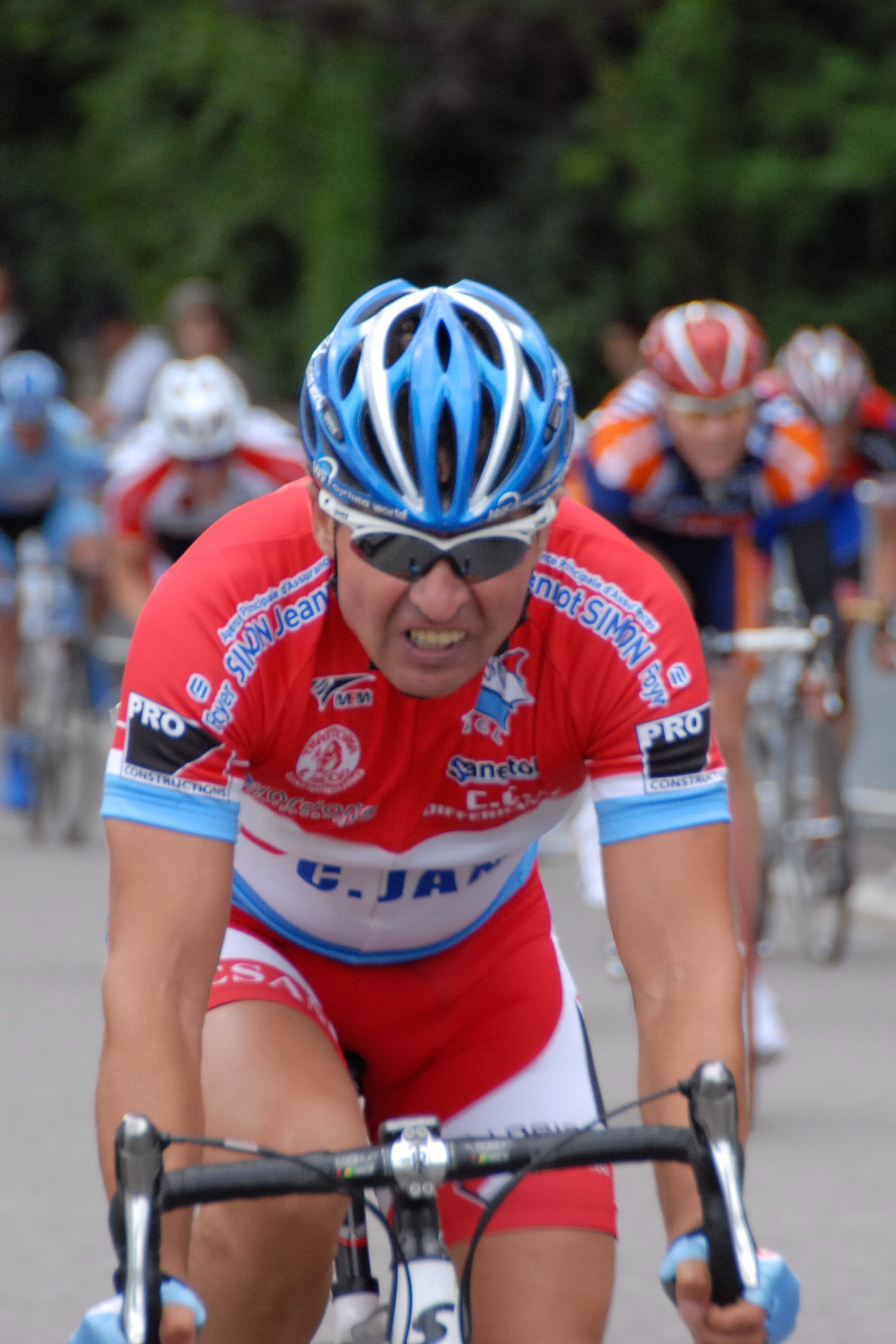 Den Enzo Mezzapesa beim Grand-Prix Banque de Luxembourg - Critérium zu Bartreng Source: Eege Photo vum 23. Juni 2007